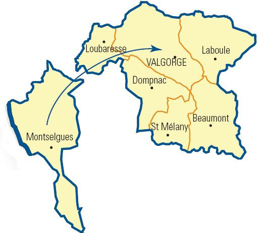 Carte détaillée des communes du canton (Ardèche)